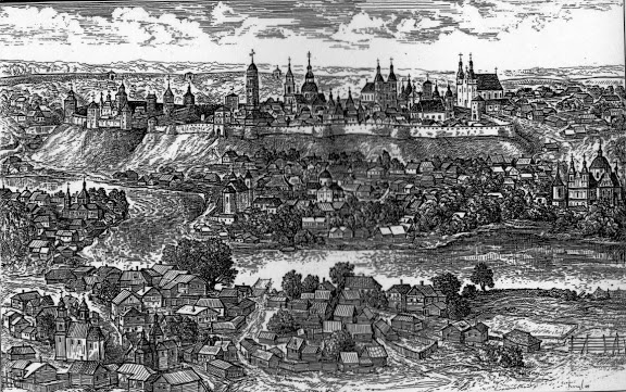 Магілёў 2-й паловы 17-18 стст. Гравюра В. Камарова